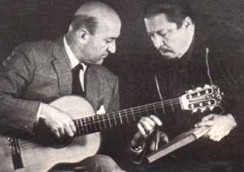 retrato